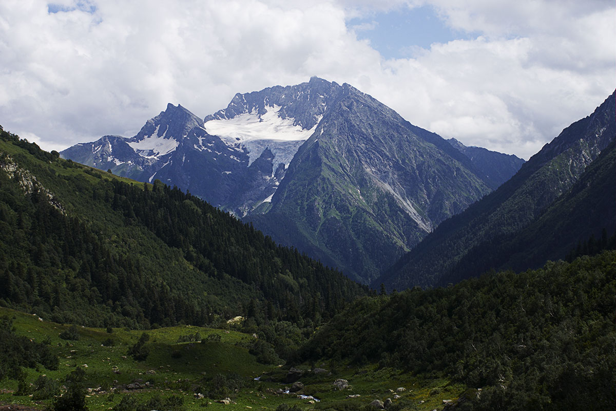 гора Цахвоа (вид с верховьев реки Чистая), Кавказ, Краснодарский Край, Россия